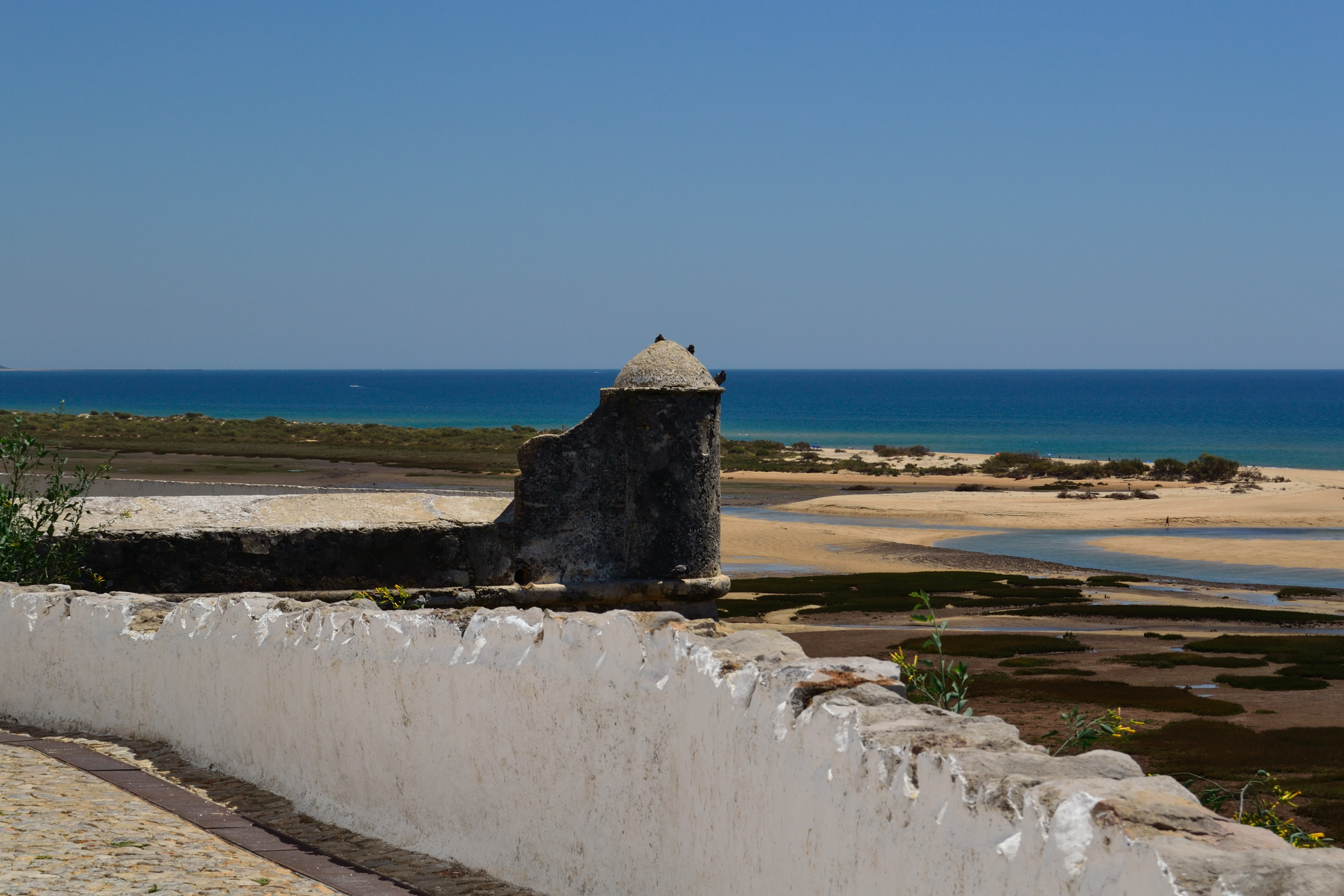 Cacela Velha, Ria Formosa, Algarve